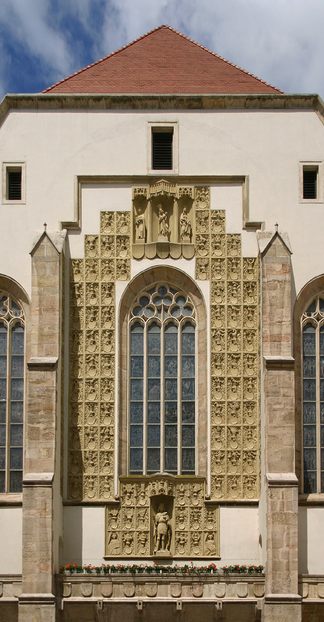 Wappenwand der Wiener Neustädter Burg (Theresianische Militärakademie)